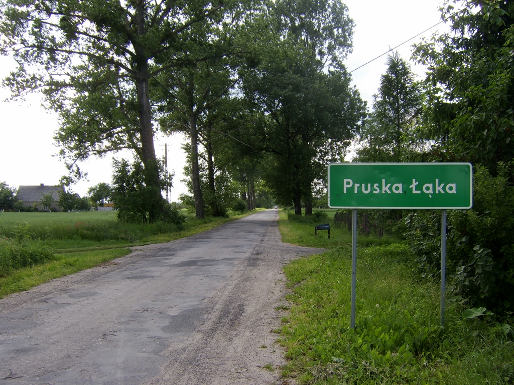 Wieś Pruska Łąka